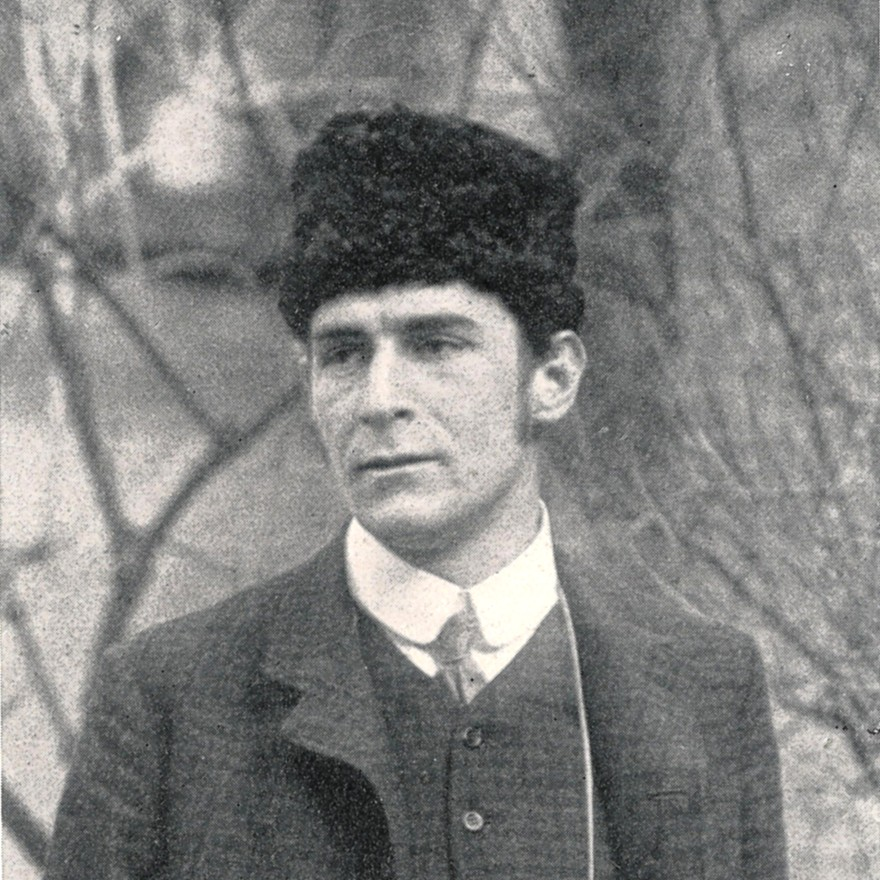 Franz Marc, 1910